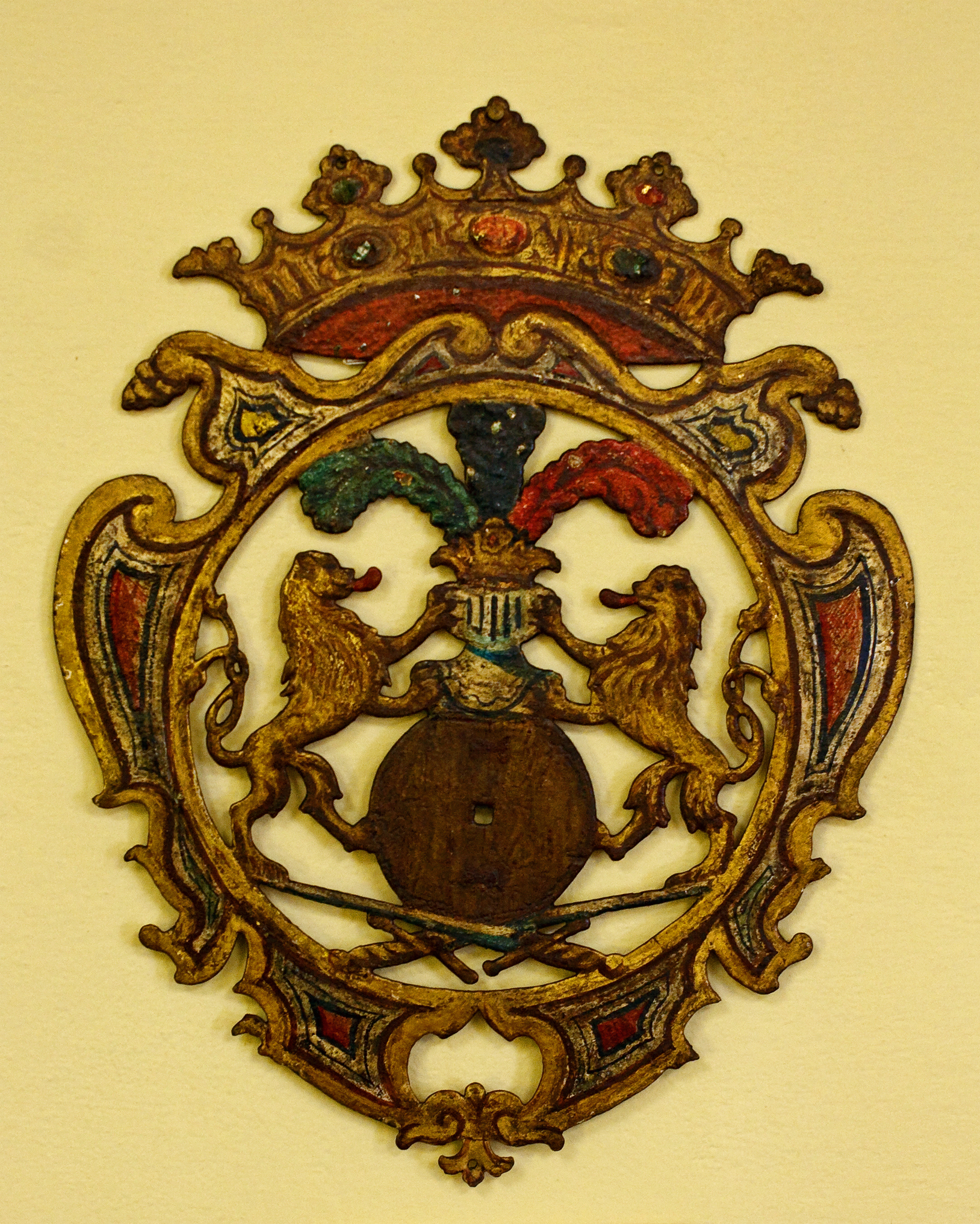 Aus der Barockzeit stammendes Zunftzeichen der Schwertfeger (Waffensaal des Museums der Stadt Steyr)